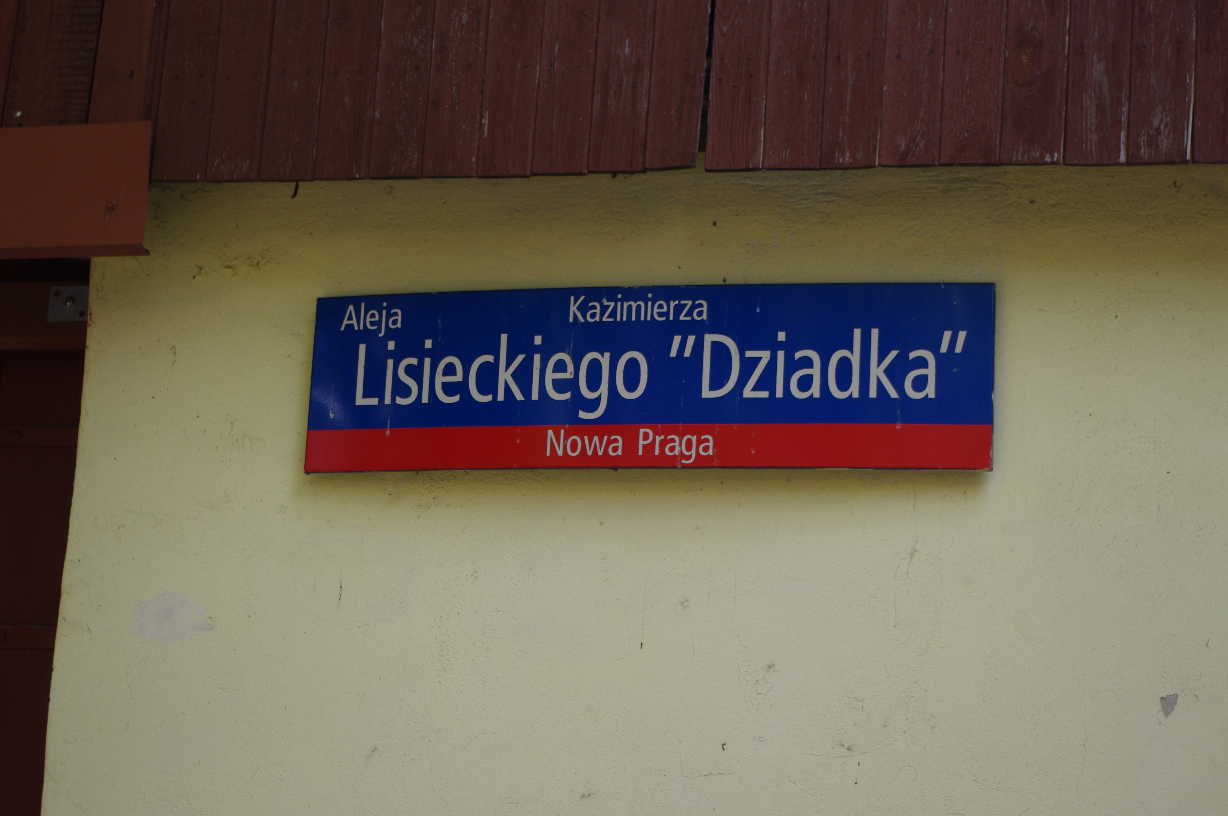 Aleja Kazimierza Lisieckiego „Dziadka” w Parku Praskim im. Żołnierzy 1 Armii Wojska Polskiego w Warszawie